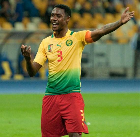 Ніколя Н'Кулу — камерунський футболіст, захисник